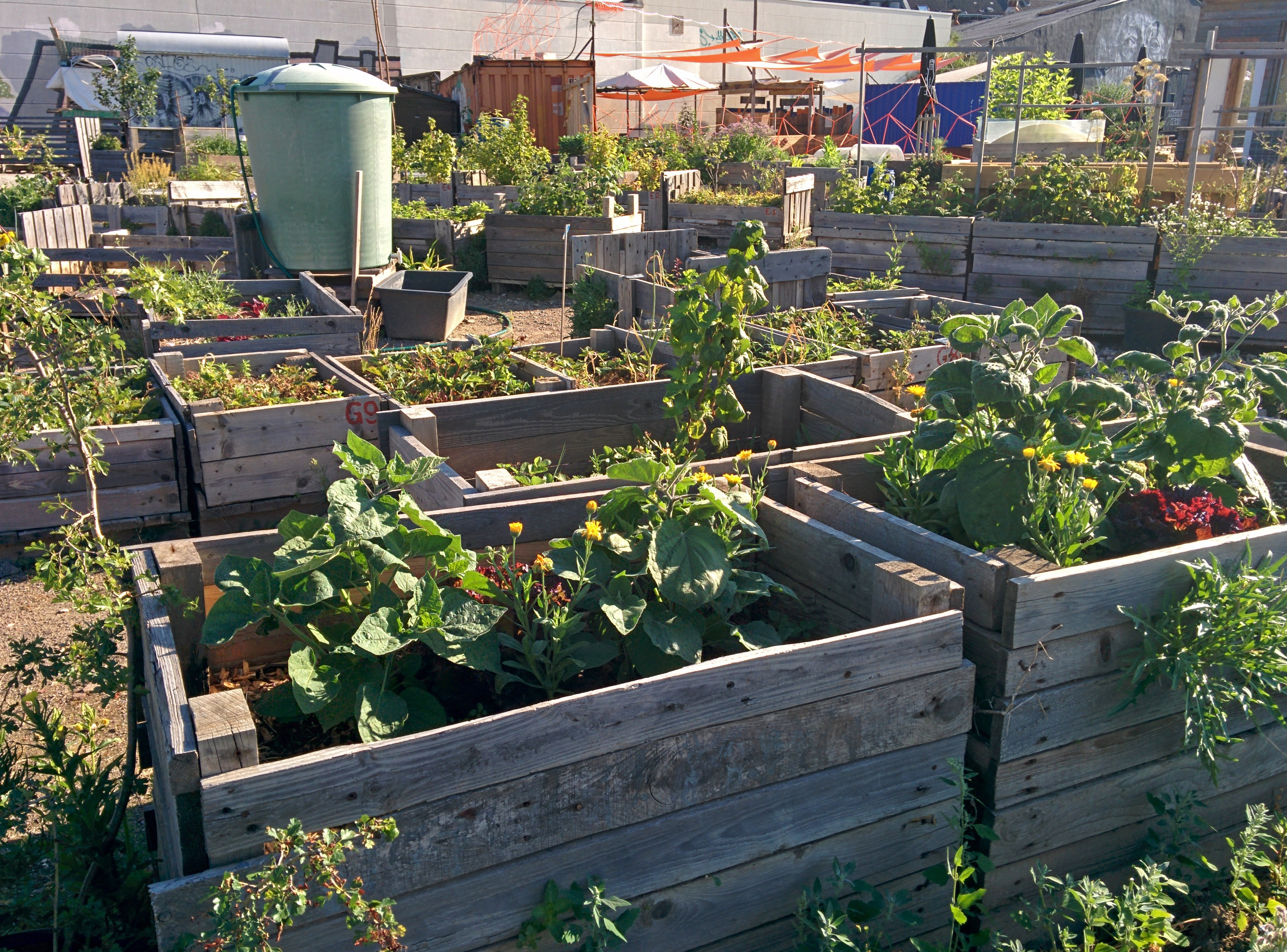 Gartenbahnof Ehrenfeld, ein Gemeinschaftsgartenprojekt in Köln-Ehrenfeld (Webseite)